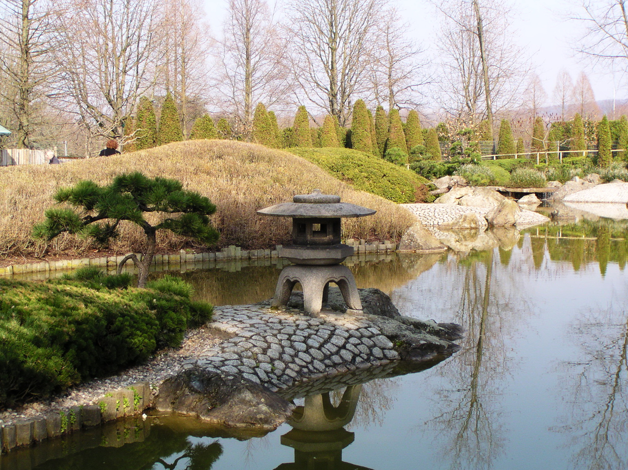 Japanischer Garten in der Bonner Rheinaue; Steinlaterne (Yukimi) am See.